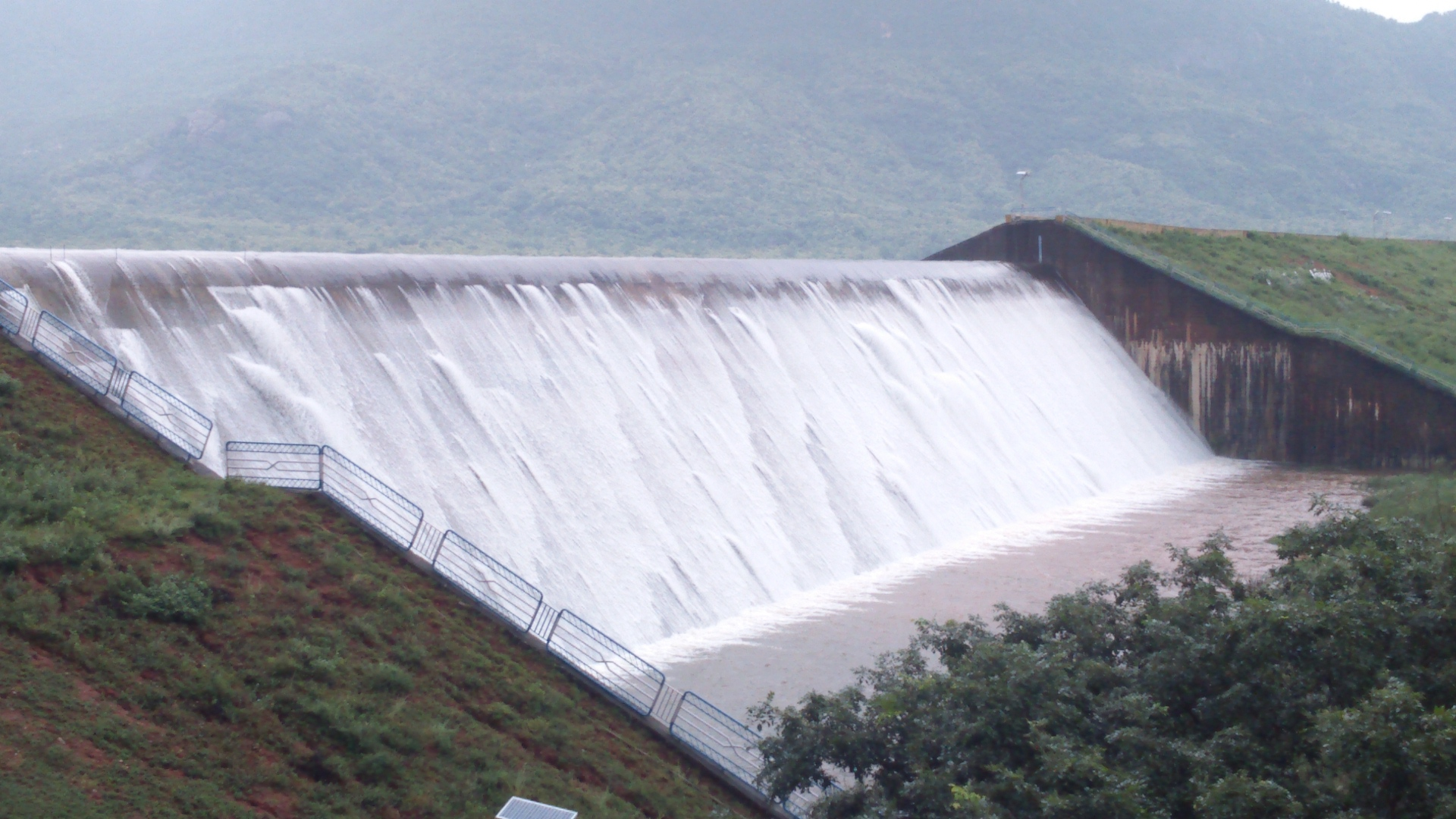 At 2015